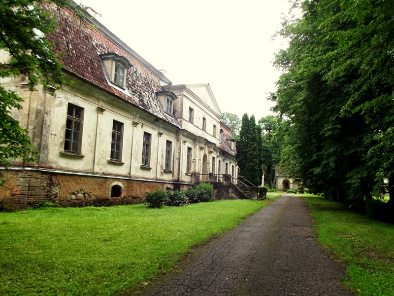 Kabiles muiža jeb Kabillen